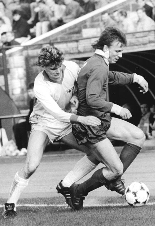 ADN-ZB-Oberst-18.3.89-sche- Berlin: Fußball-Oberliga-Punktspiel 1. FC Union - BFC Dynamo 2:3 (1:1)- Zweikampf mit Andreas Thom (BFC,r) und dem Union-Angreifer Rene Deffke.